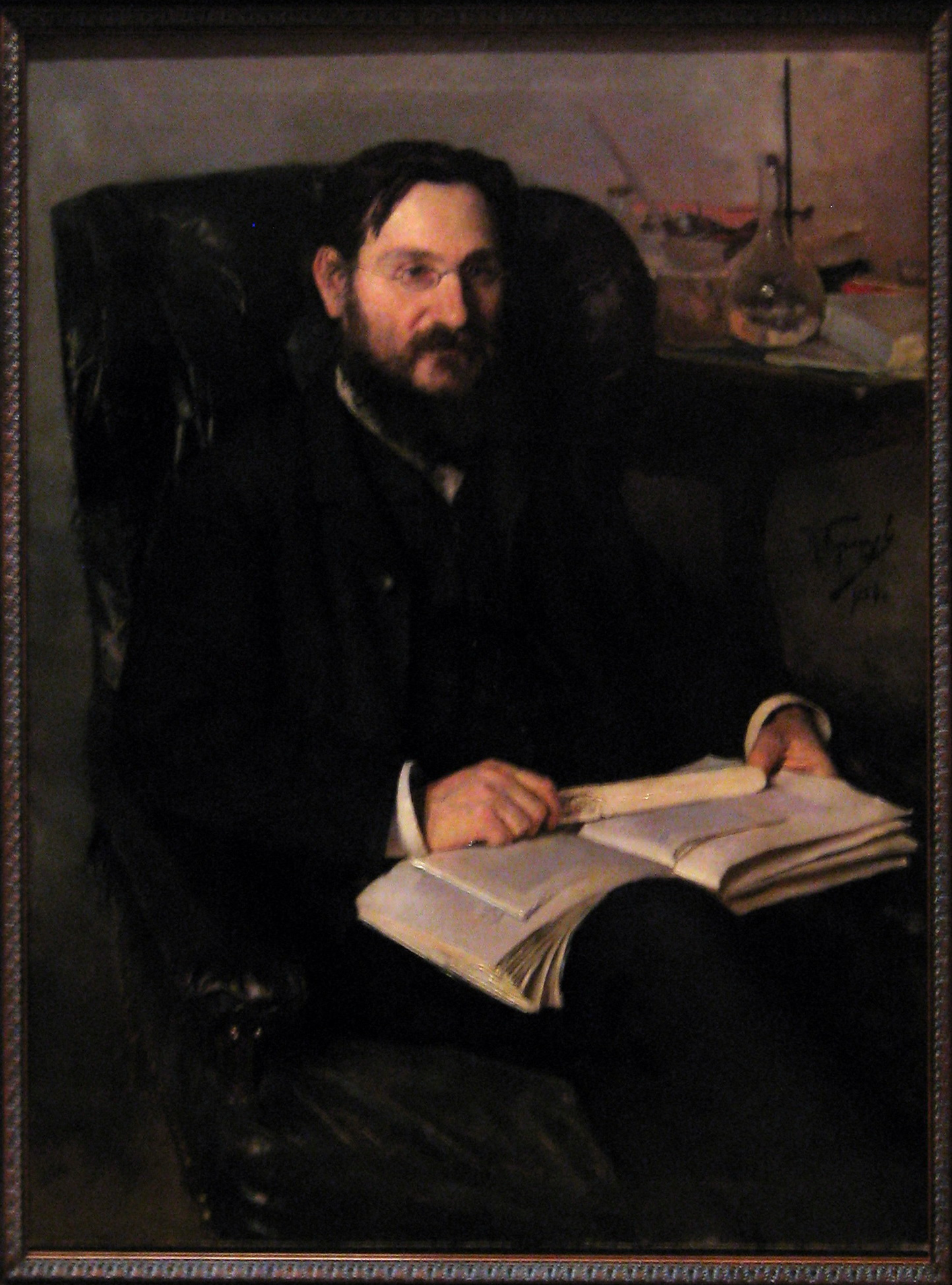 И. Мечников.